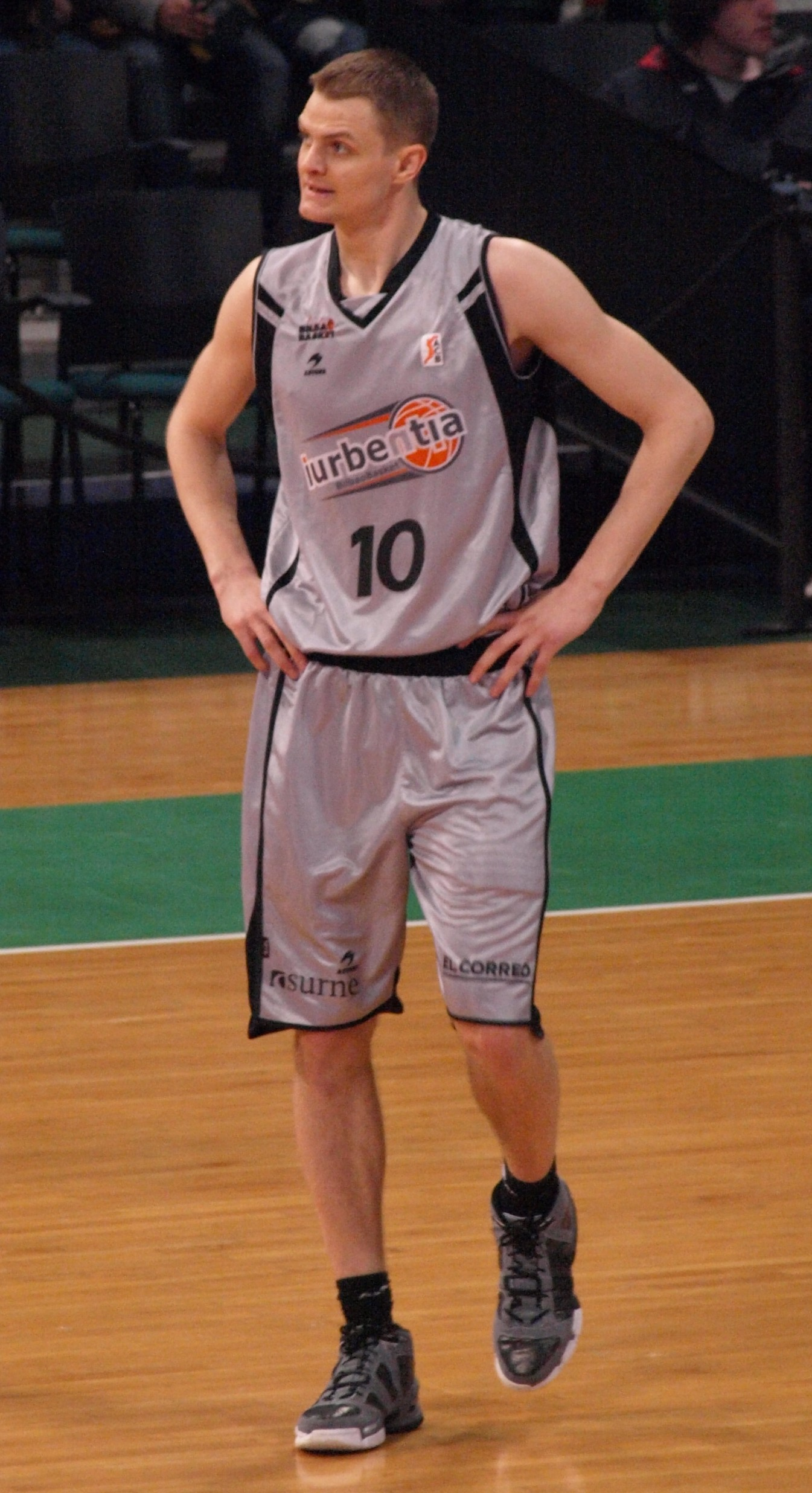 Renaldas Seibutis en el encuentro que enfrentó al Iurbetia Bilbao con el DKV Joventut de la liga ACB 2008/09 en el olímpico de Badalona